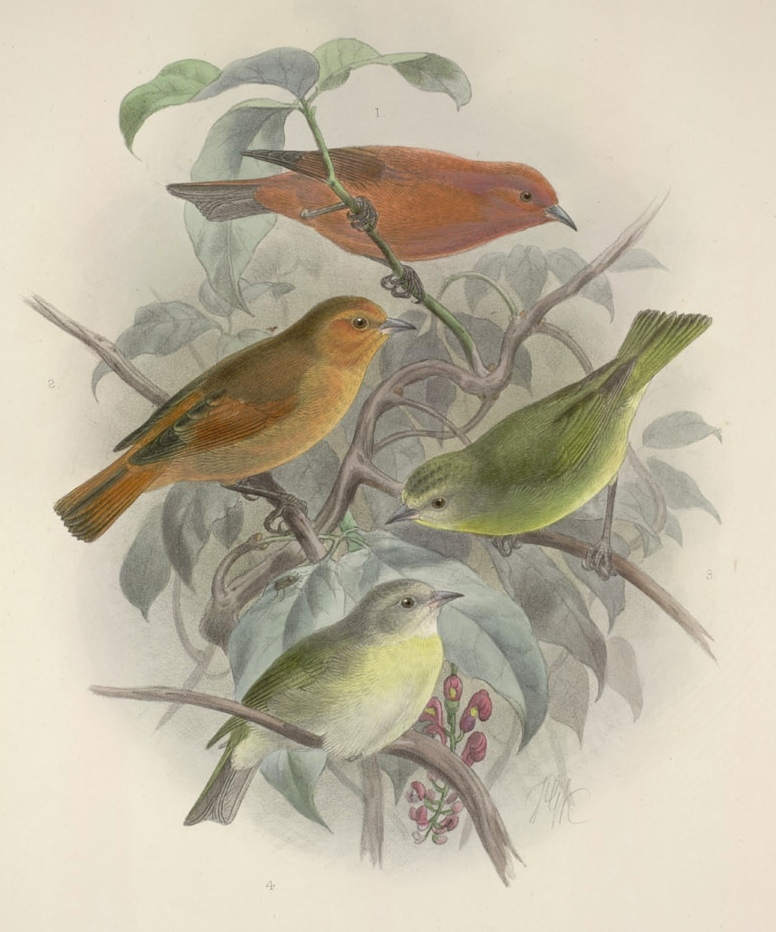 (Loxops coccineus) . (Gm) 1. male adult, 2. male jr, 3. female adult, 4. female jr 1 Male AD; 2. female JR; 3 female AD; 4. female JR.